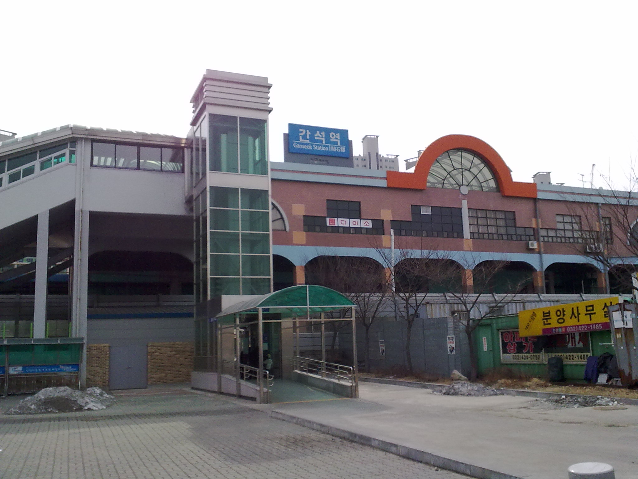 간석역